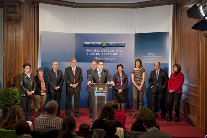 Comparecencia del Gobierno Vasco tras celebrar su Reunión de Gobierno en el Palacio Artaza de Lejona-Leioa (4 de mayo de 2010)